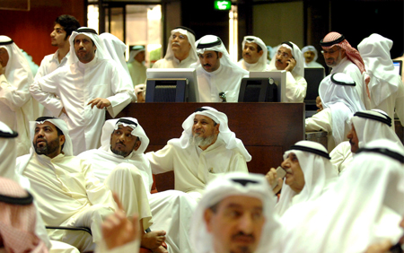 KWT02 KUWAIT stock market (KUWAIT) 8/10/2008.- Agentes de bolsa durante la jornada de hoy, 8 de octubre de 2008, en la bolsa de Kuwait. La bolsas de Oriente Medio cerraron hoy con fuertes pérdidas, algunas de ellas amortiguadas respecto a la víspera, en una ola de ventas que afecta a los mercados internacionales y que también ha contagiado a la región. En Kuwait, el segundo mercado bursátil en importancia en la región, se amortiguaron hoy las pérdidas de los últimos días. El índice general descendió el 1,4 por ciento, hasta los 11.472 puntos, en una tendencia a la baja que comenzó nada más abrir el mercado. EFE/Raed Qutena